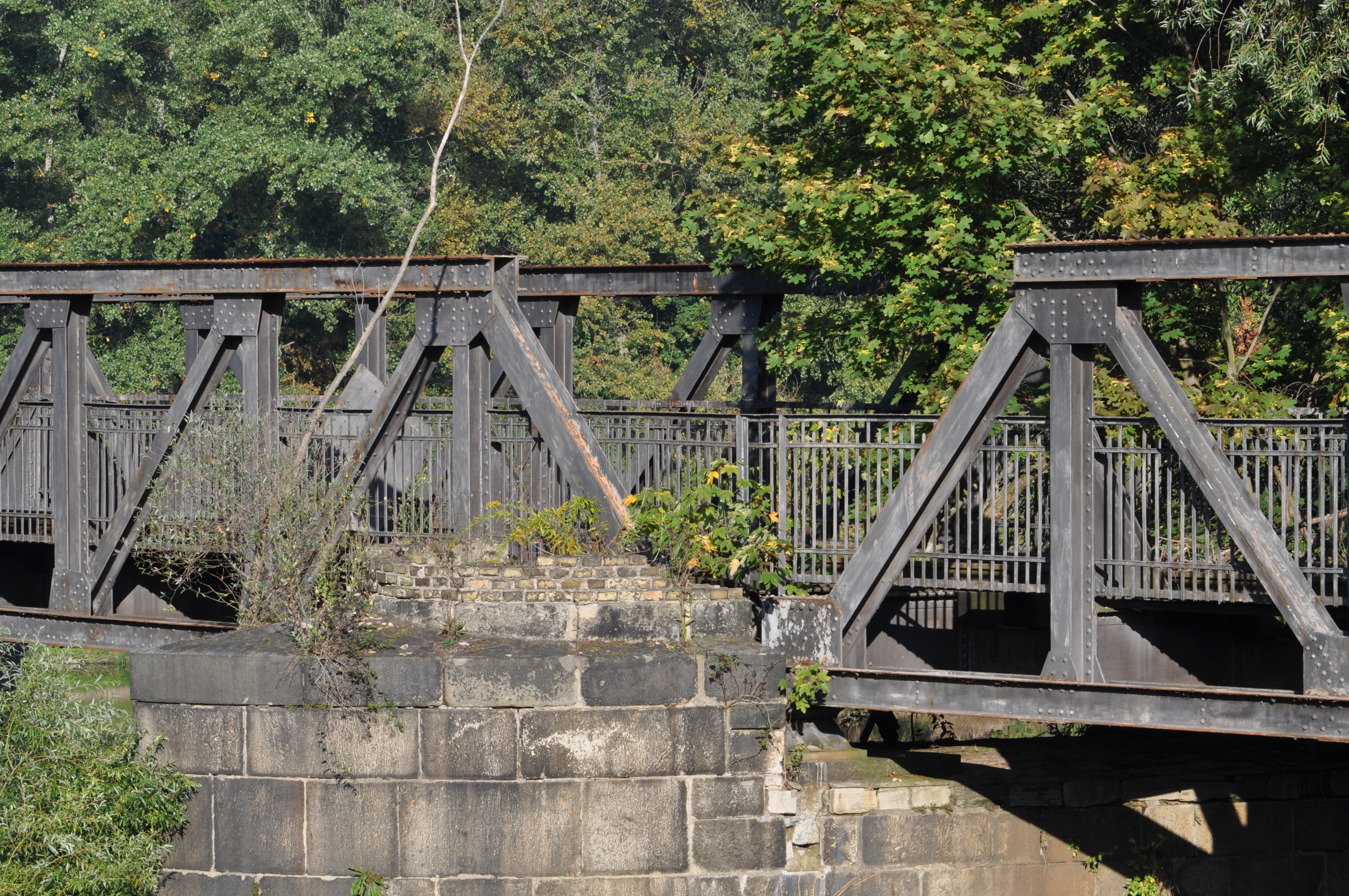 Detail der Eisenbahnbrücke der stillgelegten Eisenbahnlinie Magdeburg-Potsdam über die Alte Elbe in Magdeburg. This is a photograph of an architectural monument.It is on the list of cultural monuments of Magdeburg